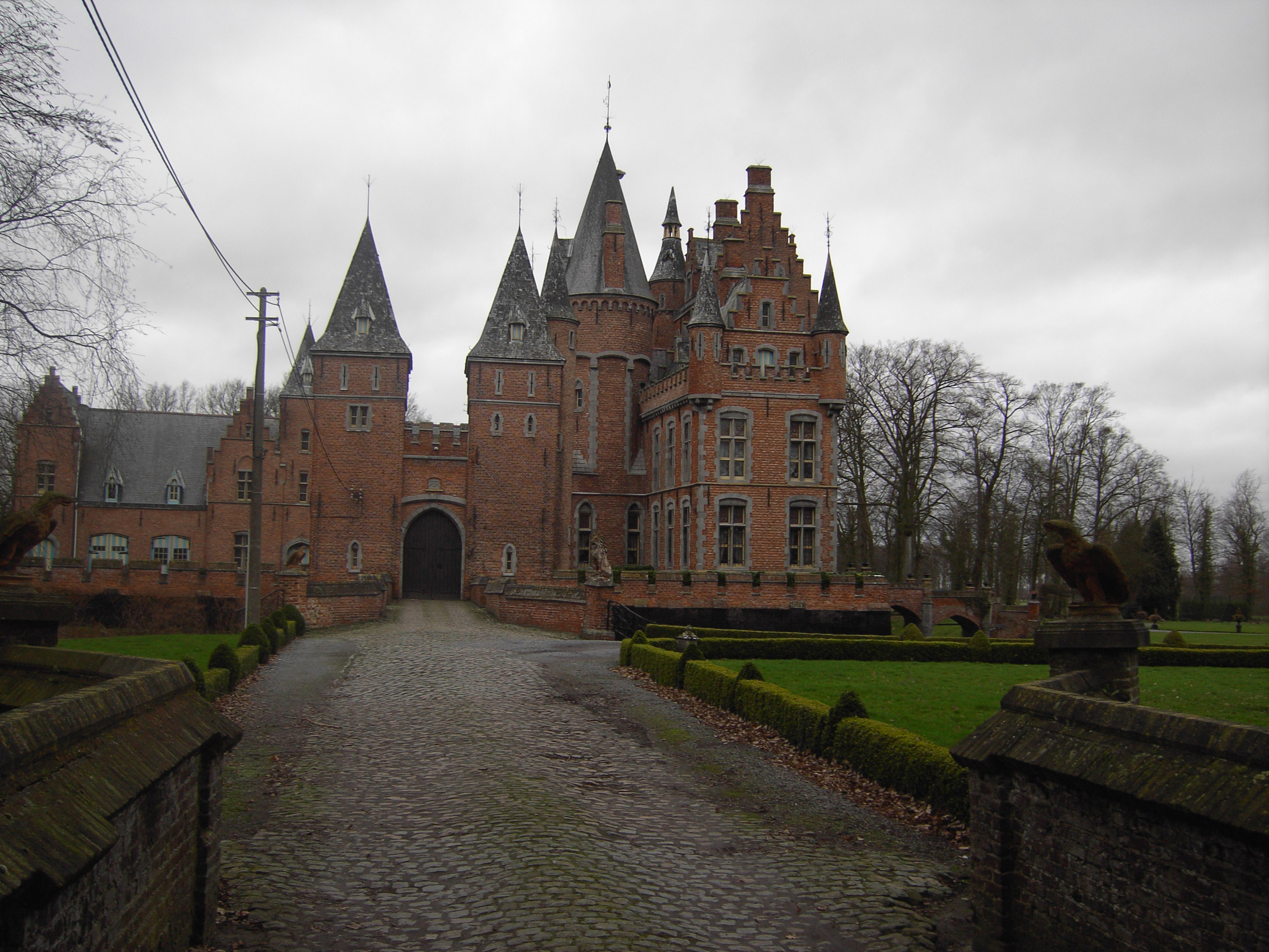 Lovendegem - Kasteel Dons de Lovendegem